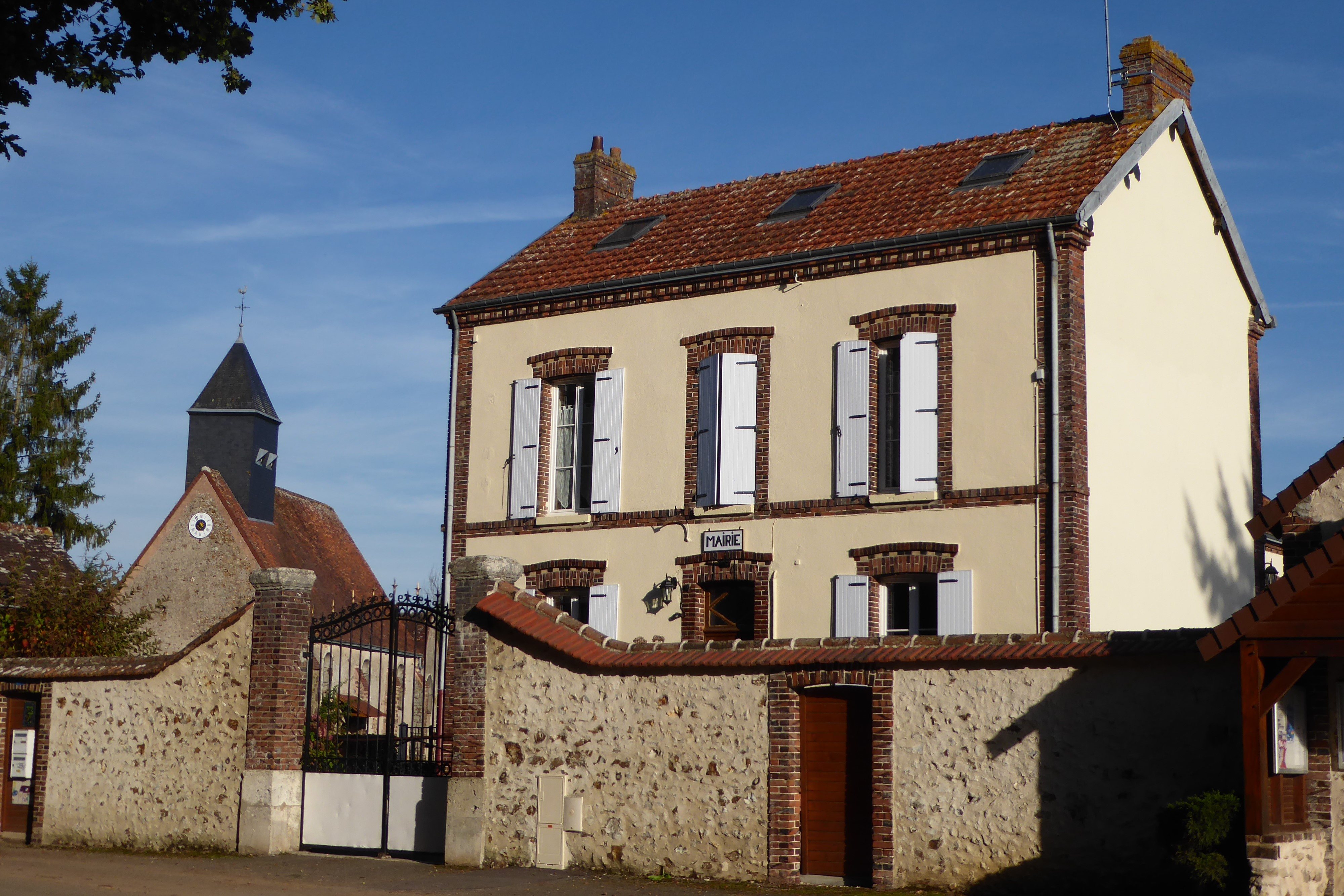 mairie et église Saint-Antoine, Mottereau, Eure-et-Loir, France.